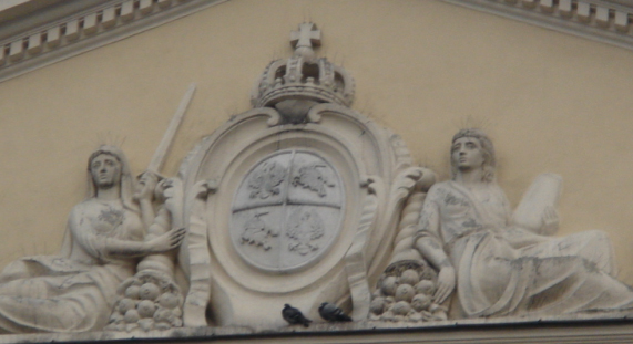 Trybunał Koronny w Lublinie, motyw z herbem Pogoń i polskim Orłem. Ta charakterystyczna płaskorzeźba znajduje się na górze elewacji zewnętrznej lubelskiego budynku. W tarczy, która znajduje się po środku tej płaskorzeźby są przedstawione dwa herby. Jednym z nich jest Orzeł będący symbolem Polski, drugim jest Pogoń - symbol Litwy. Nad herbem jest korona królów Polski zwieńczona krzyżem, zaś po obu stronach herbu znajdują się postacie siedzących kobiet. Jedna z nich w ręku trzyma miecz, a druga wagę - symbole sprawiedliwości. U nóg jednej z nich leży lew. W 1977 roku płaskorzeźba została zrekonstruowana.